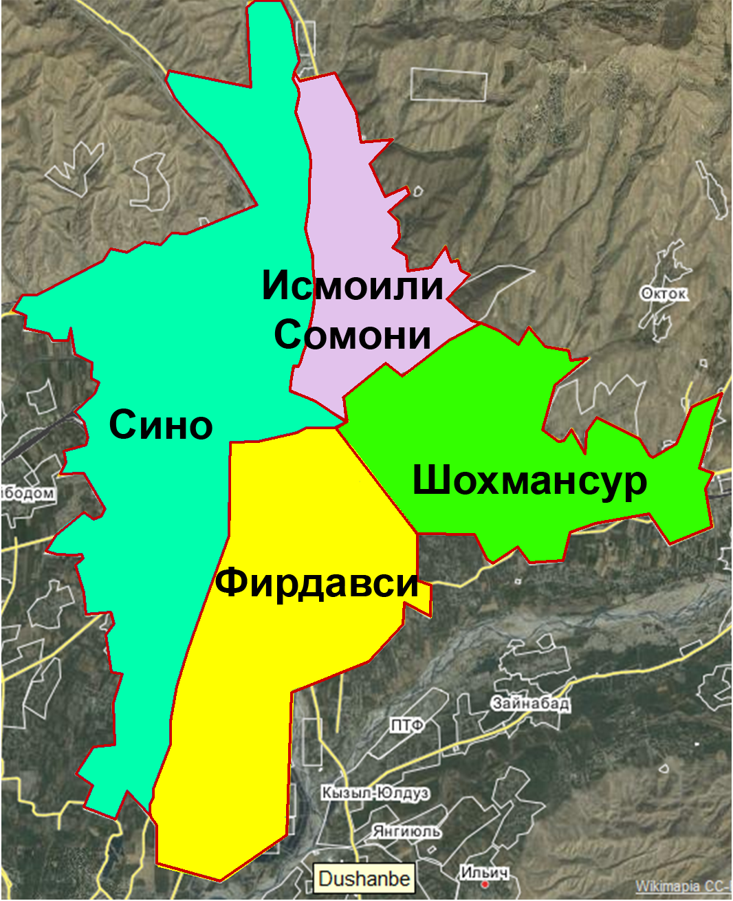 Тоҷикӣ: Таксимоти маъмурии шахри Душанбе.